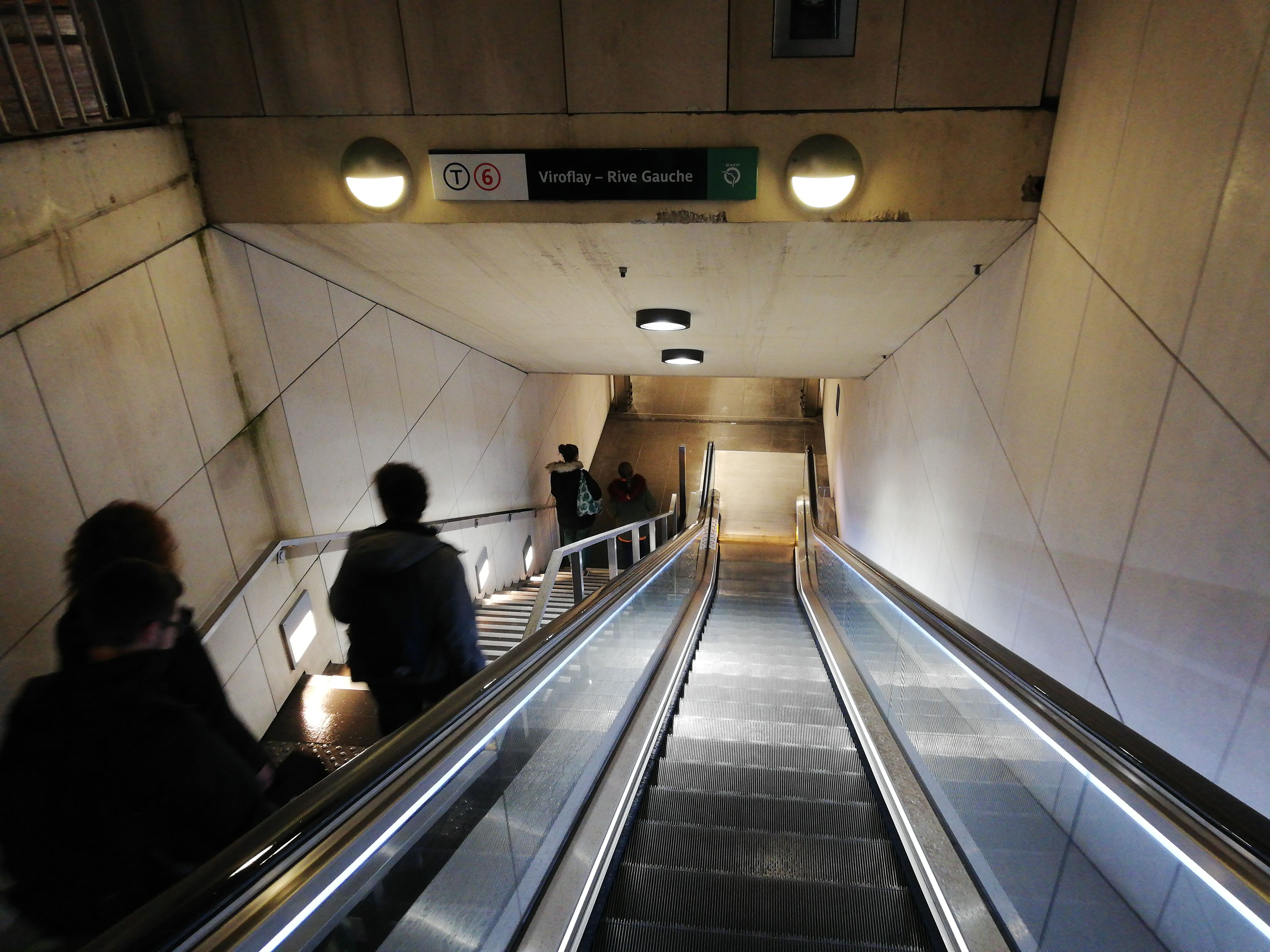 Accès à la station souterraine Viroflay-Rive-Gauche de la ligne 6 du tramway, de nuit, en 2018.